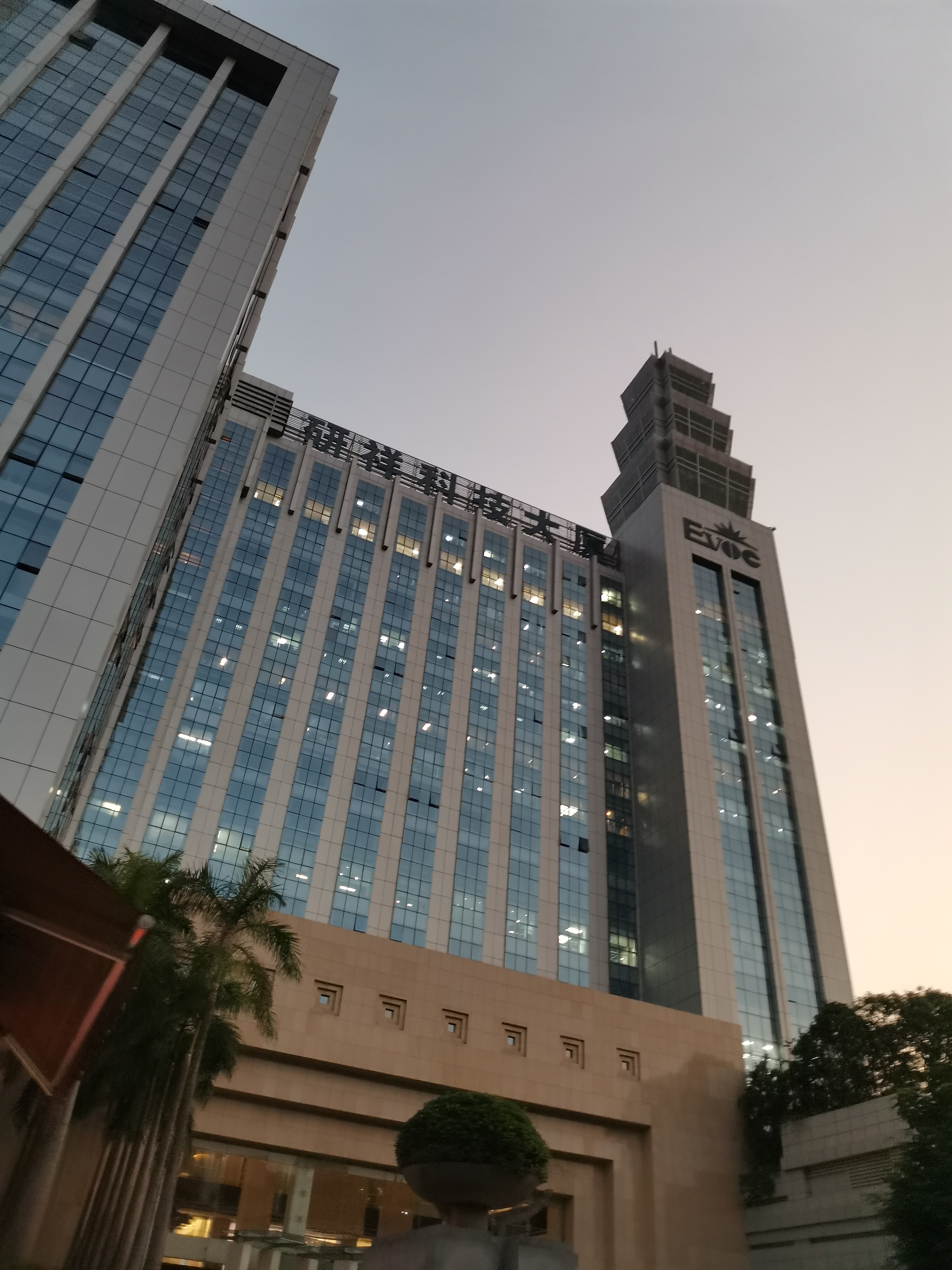 深圳研祥科技大厦，是研祥科技集团总部所在